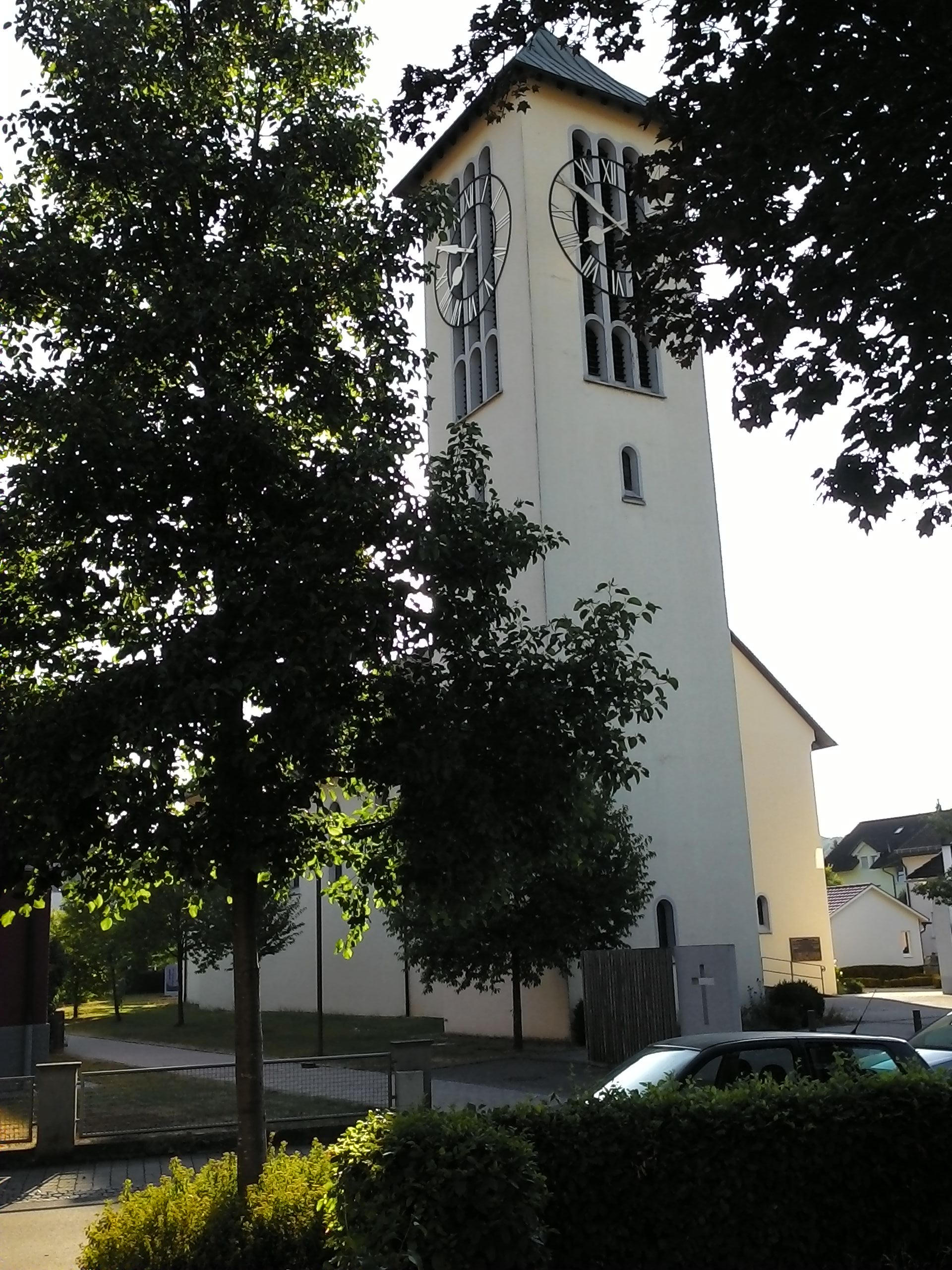 Wutöschingen (Ortschaft) Katholische Kirche, Landkreis Waldshut, Baden-Württemberg.